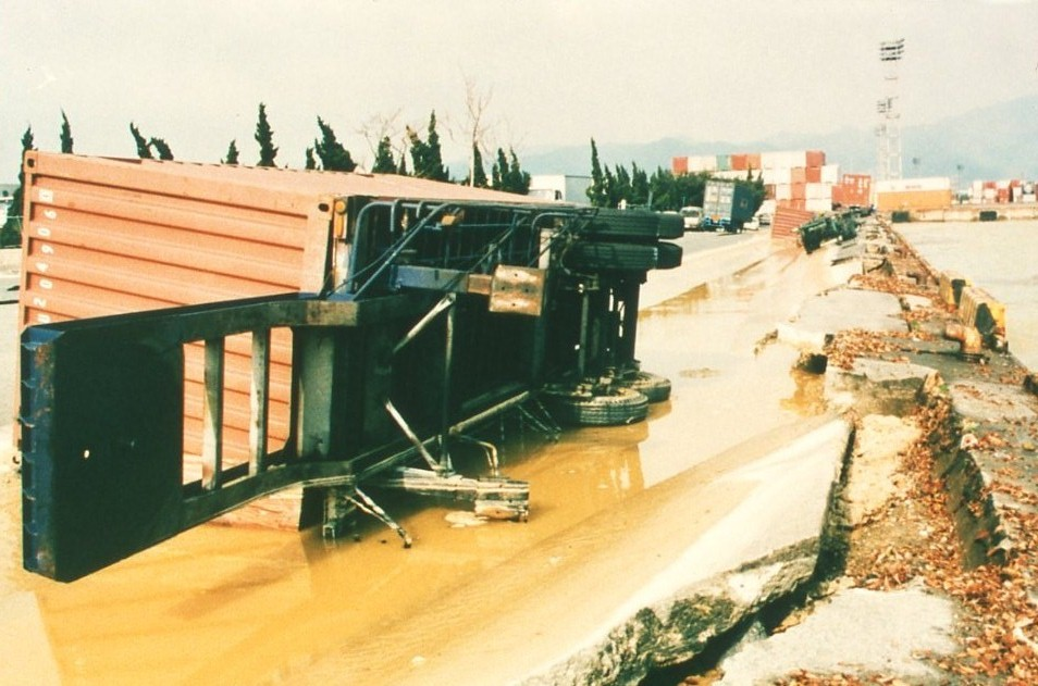 神戸市中央区地内。 神戸ポートアイランドで液状化現象により、横転した駐車車両。